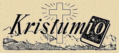 Vinjett till den grönländska tidningen Kristumio.